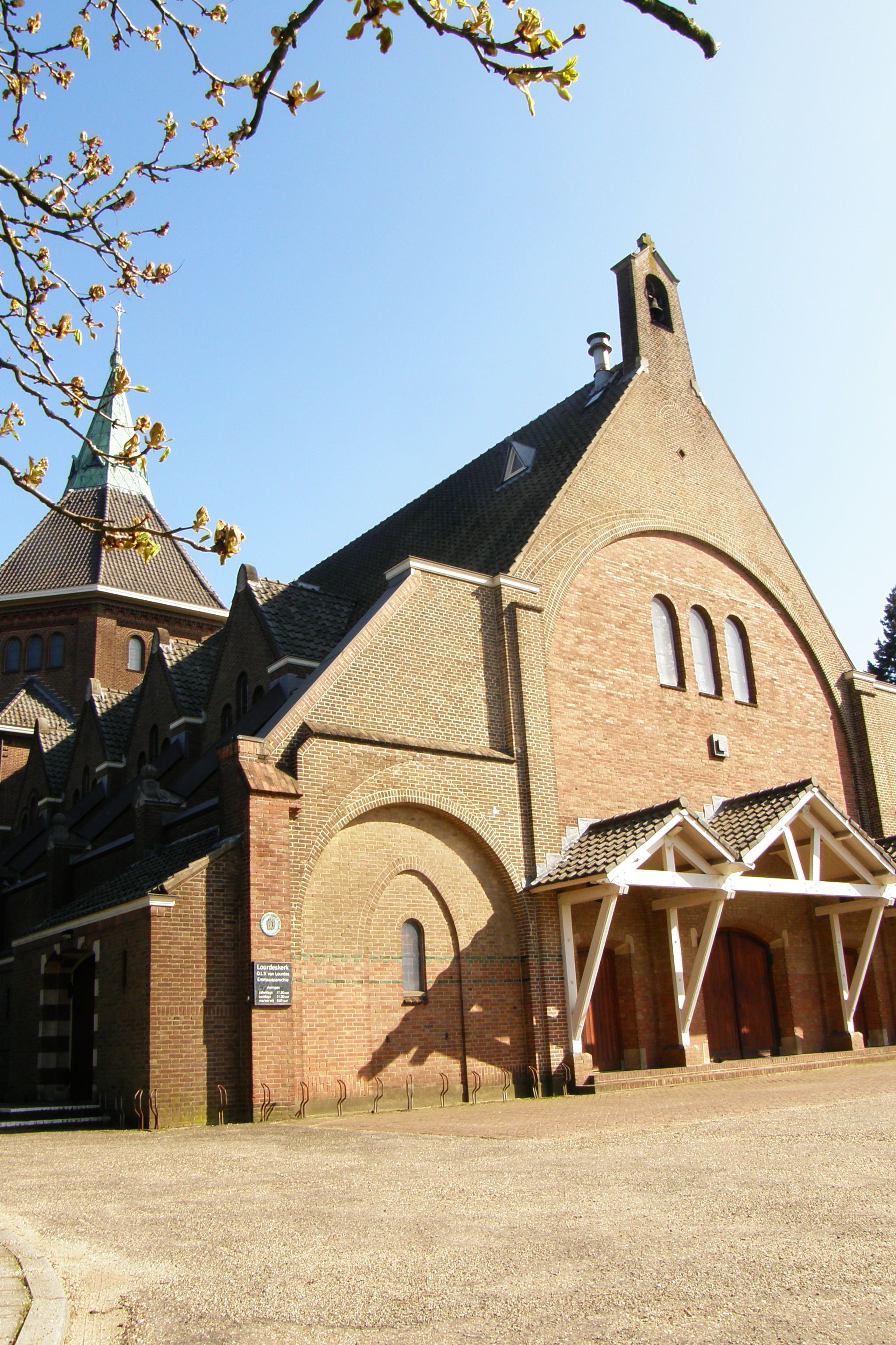 RK Kerk OLV Lourdes Nijmegen Voorgevel